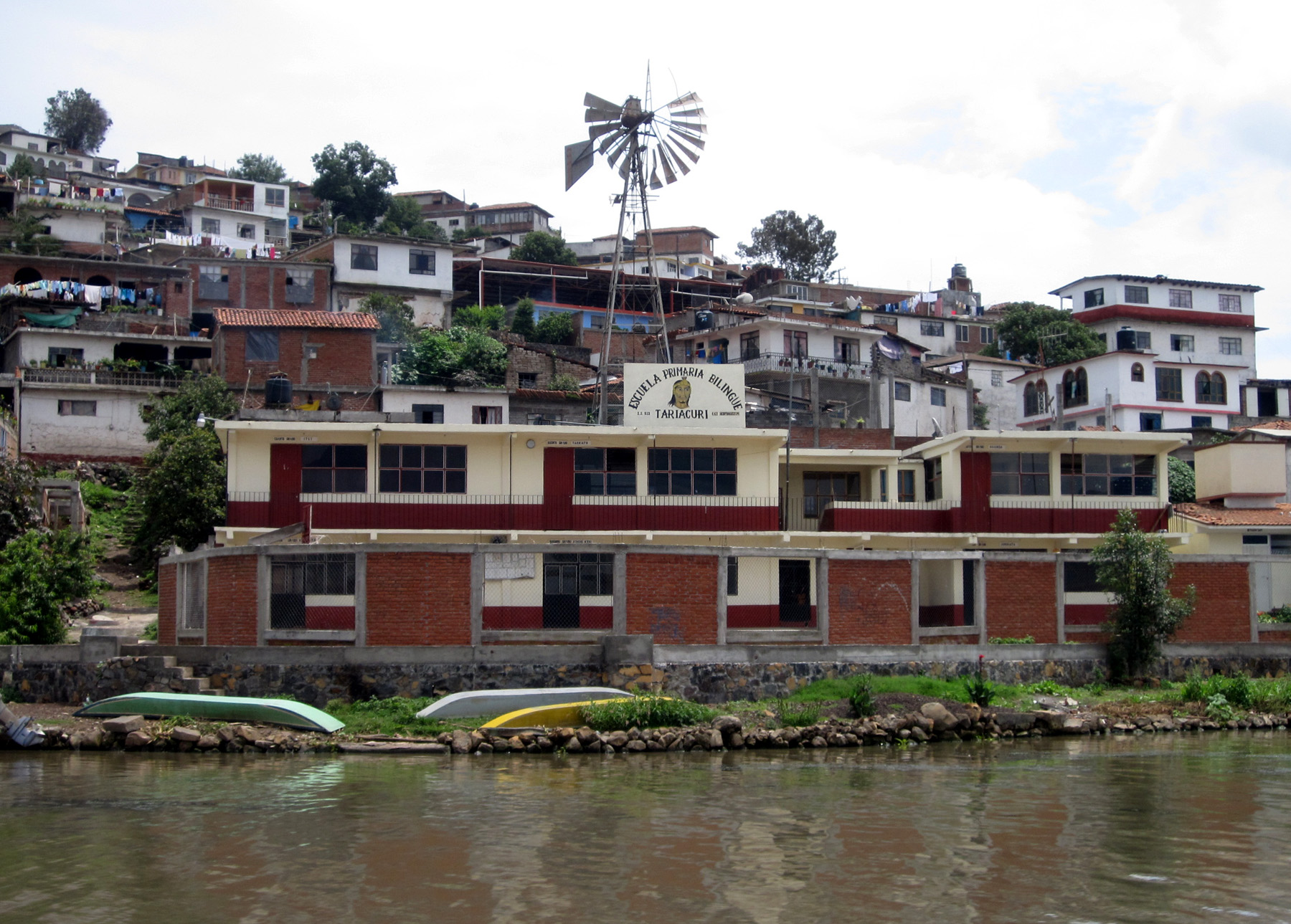 Tariacuri, tospråklg grunnskole med undervisning på purépecha og spansk på øya Janitzio i Michocán i Mexico